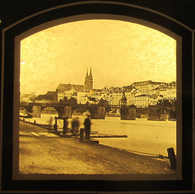 Linke Hälfte einer Glas-Stereoansicht der Mittleren Rheinbrücke in Basel im Layout von Claude-Marie Ferrier. Aufnahme um 1854/55 mit dem Bauzustand der Brücke vor den Änderungen von 1857 (die Käppelijoch-Kapelle steht noch auf dem fünften Joch. Die Steinbänke sind noch nicht gesetzt).